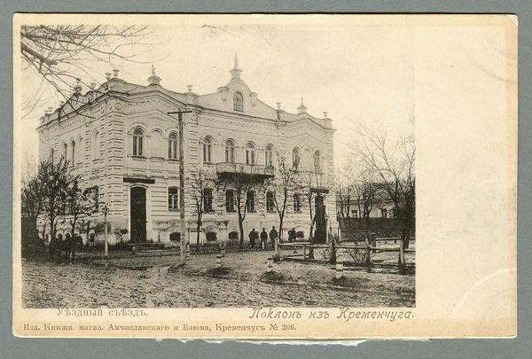 Здание Кременчугского земства (уездный съезд) до 1917 года